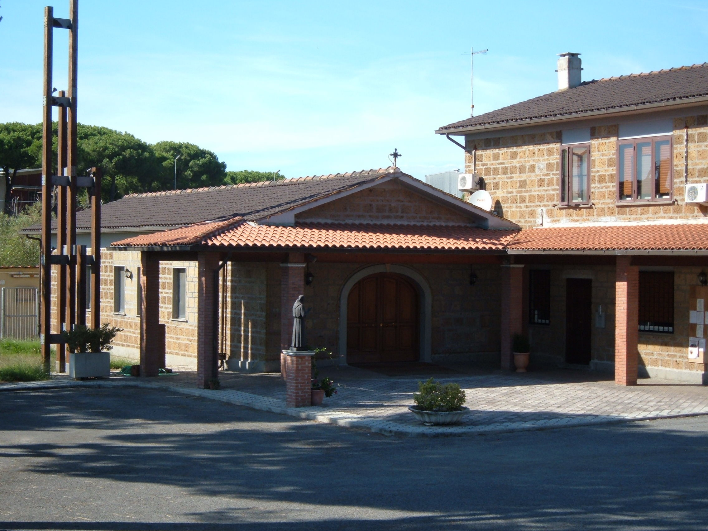 La chiesa di Sant'Andrea apostolo in località Osteria Nuova, a Roma.